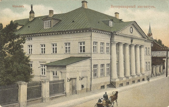 Юрьевский (Дерптский) ветеринарный институт (1873—1918) - высшее учебное заведение Российской империи.